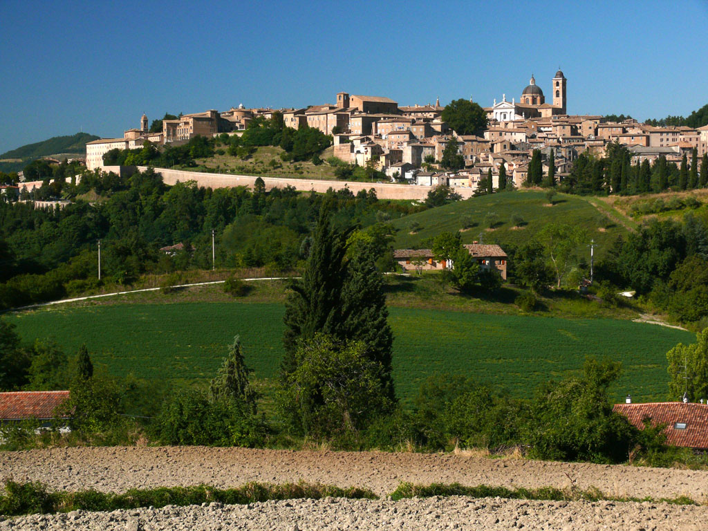 Urbino: panorama